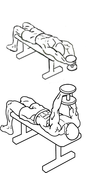 Упражнение "пуловер"